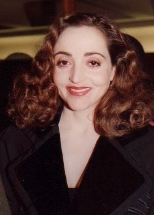 Dominique Blanc à la cérémonie des Césars.